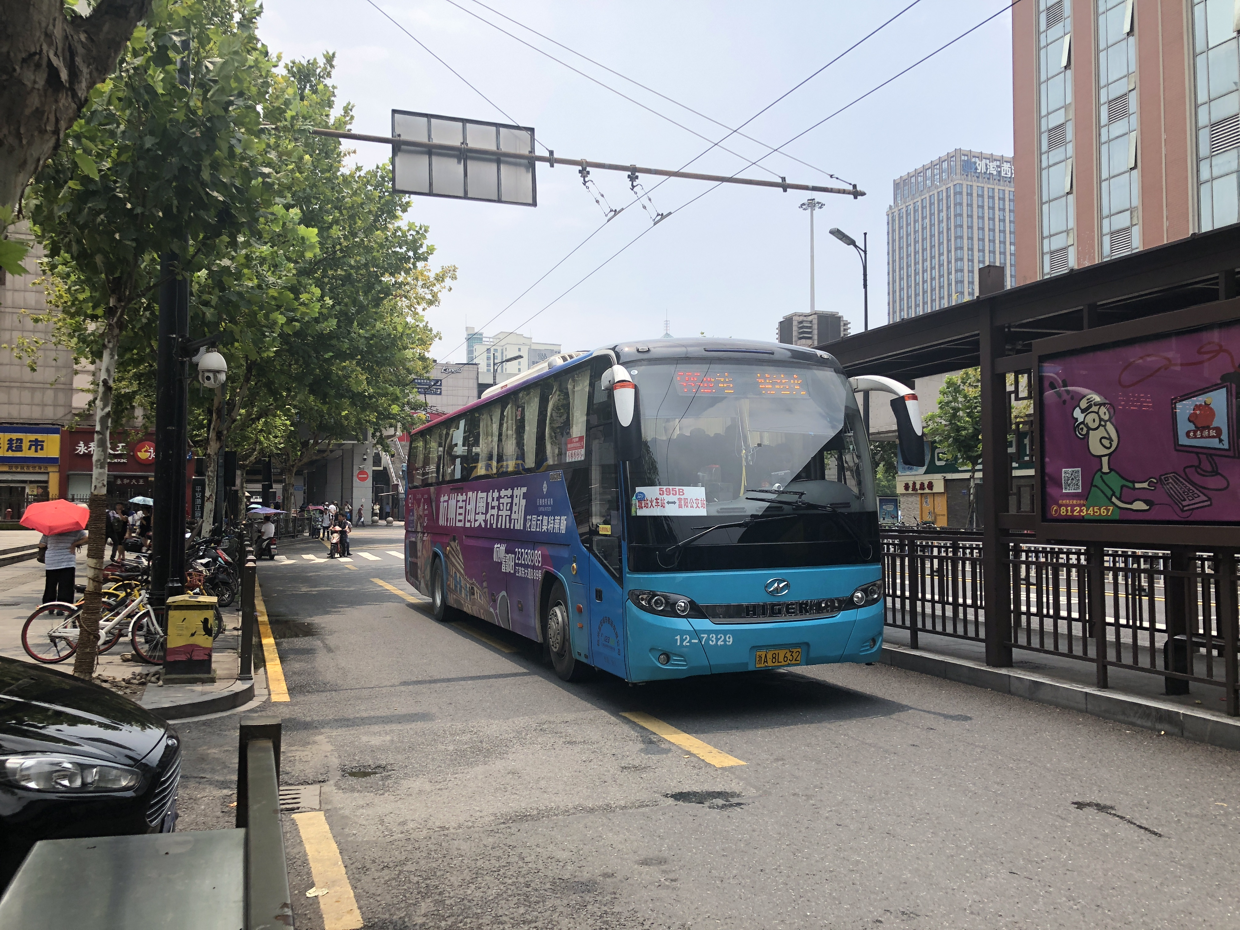 中文（中国大陆）: 杭州595